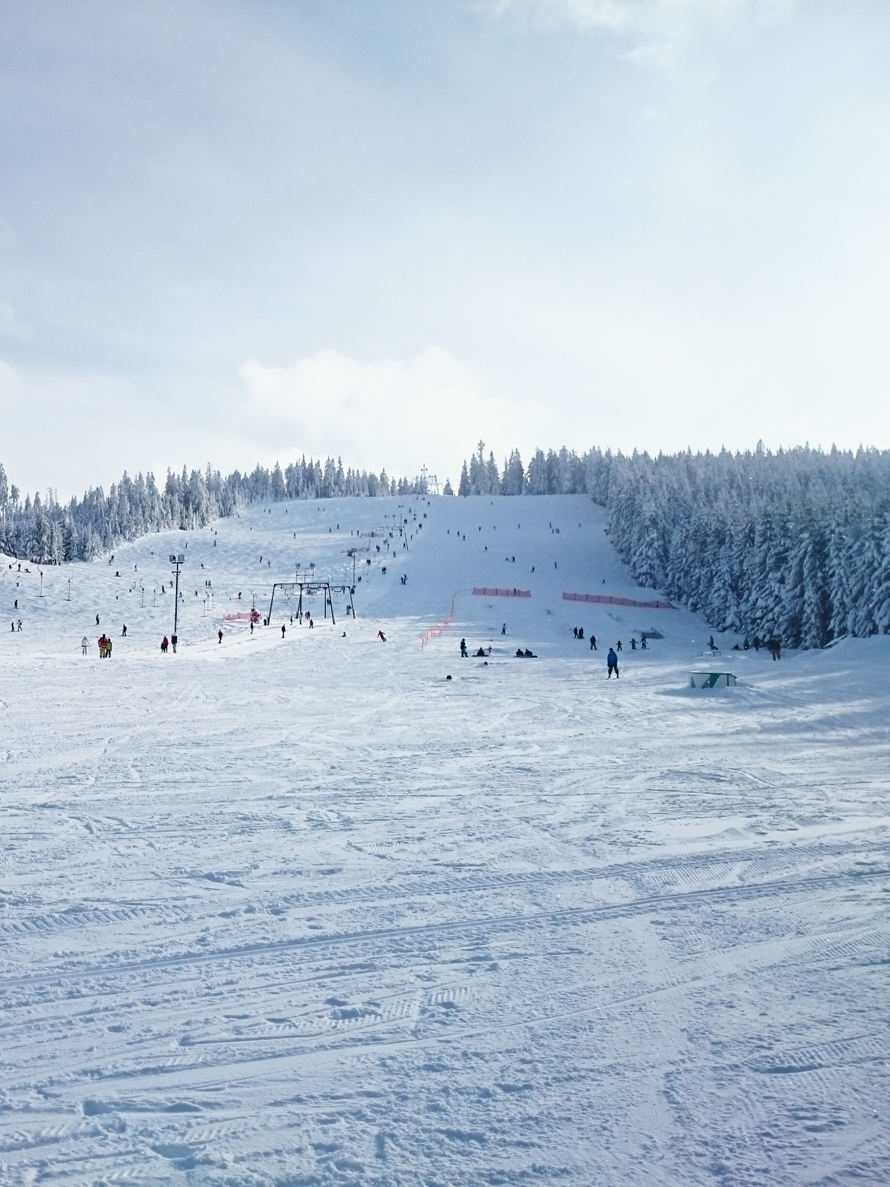 Mehliskopf, Skipiste im Winter